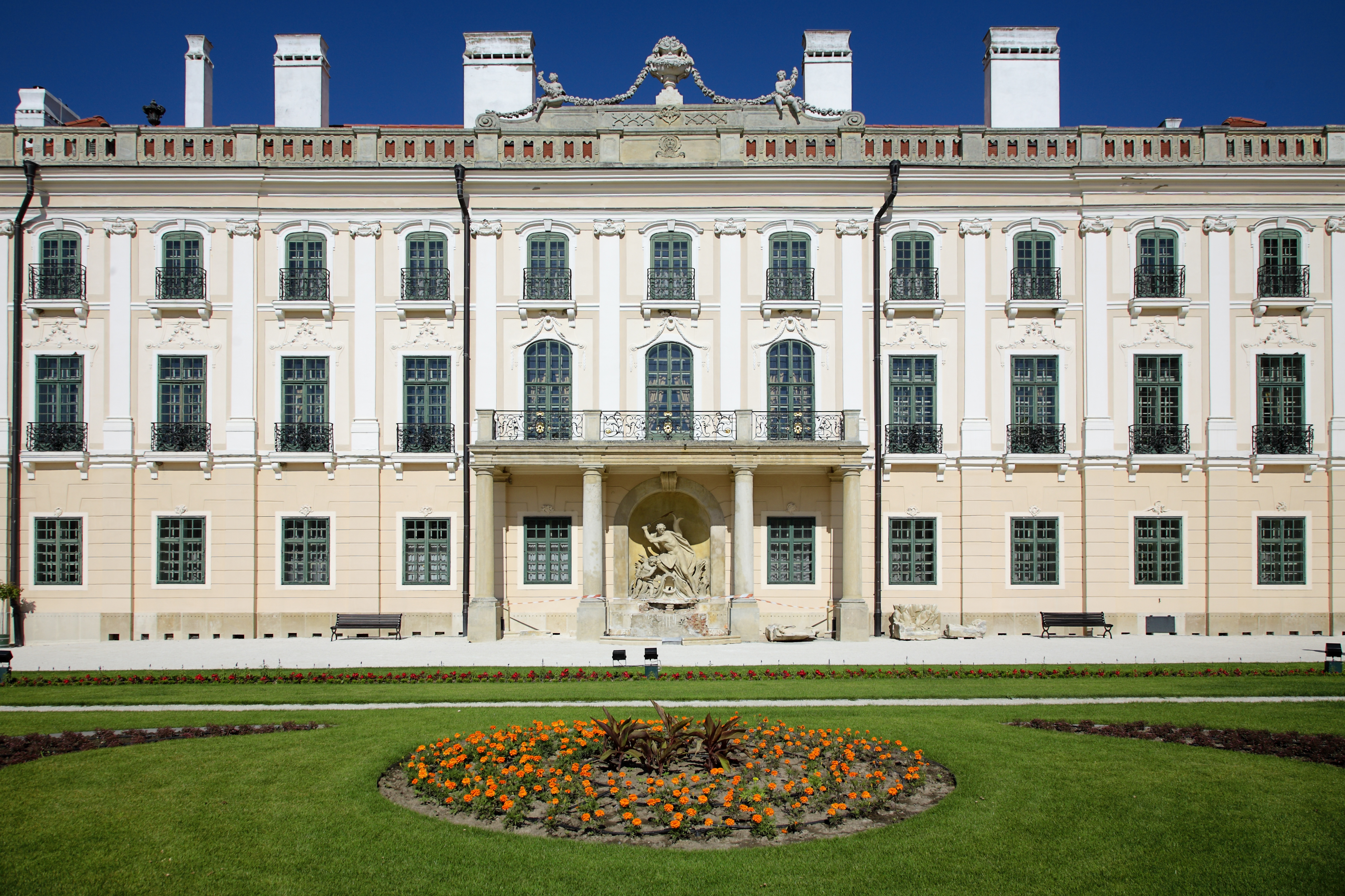 Esterházy-kastély (Fertőd, Madách Imre sétány) This is a photo of a monument in Hungary, Identifier: 4051